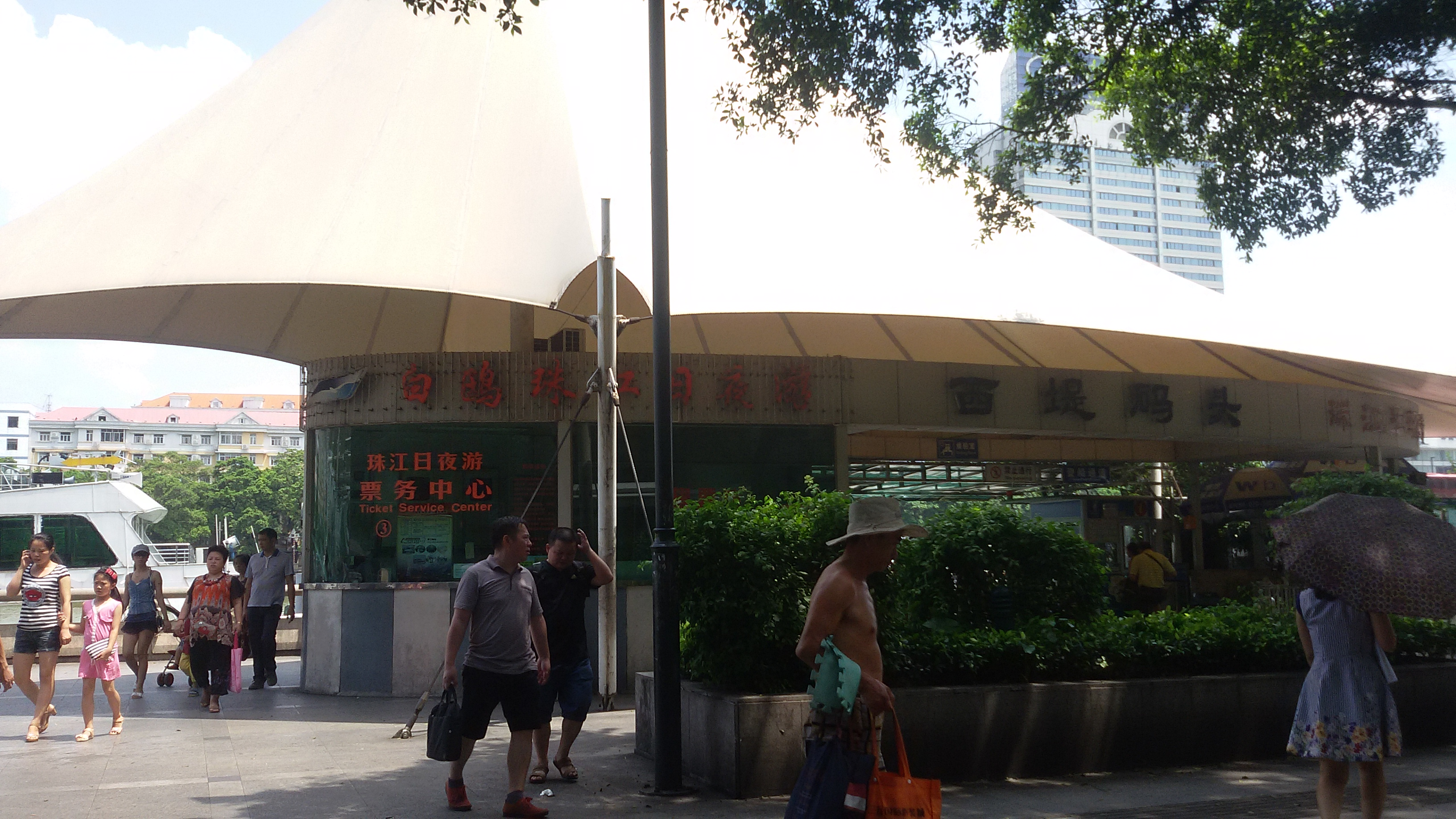 粵語: 西堤碼頭